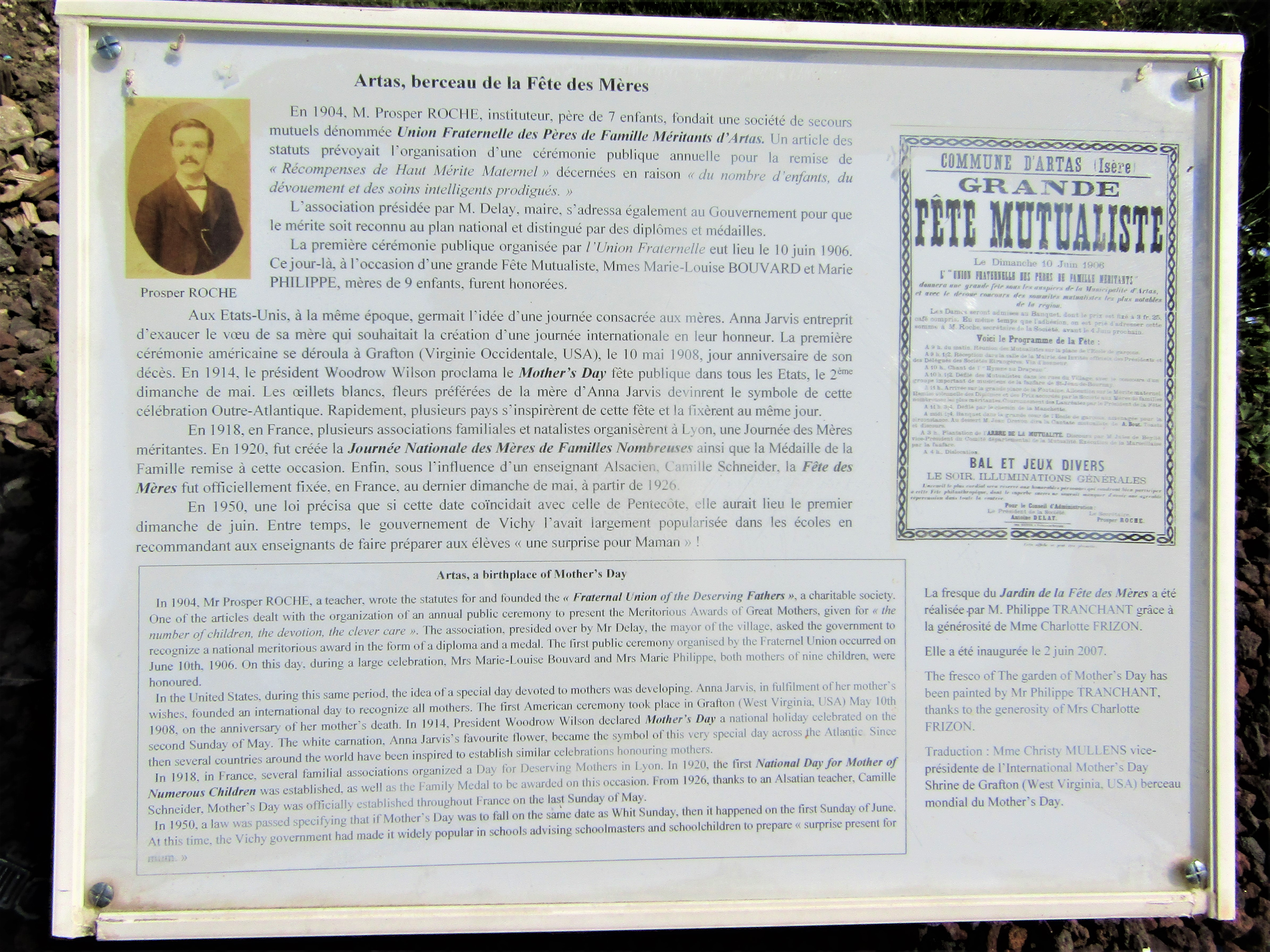 Panneau sur la fête des mère à Artas (extérieur)